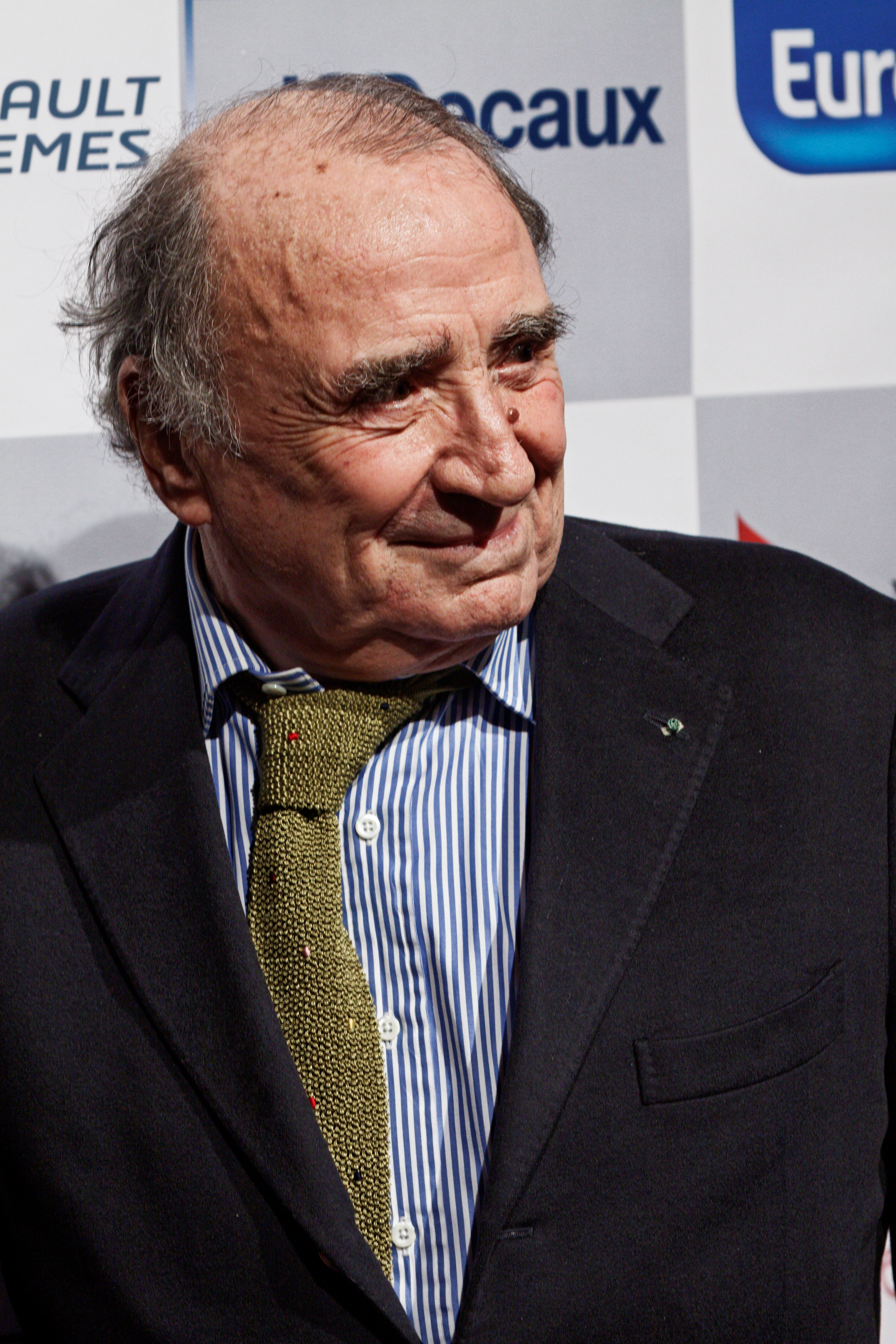 Claude Brasseur posant lors du photocall du festival automobile 2013.